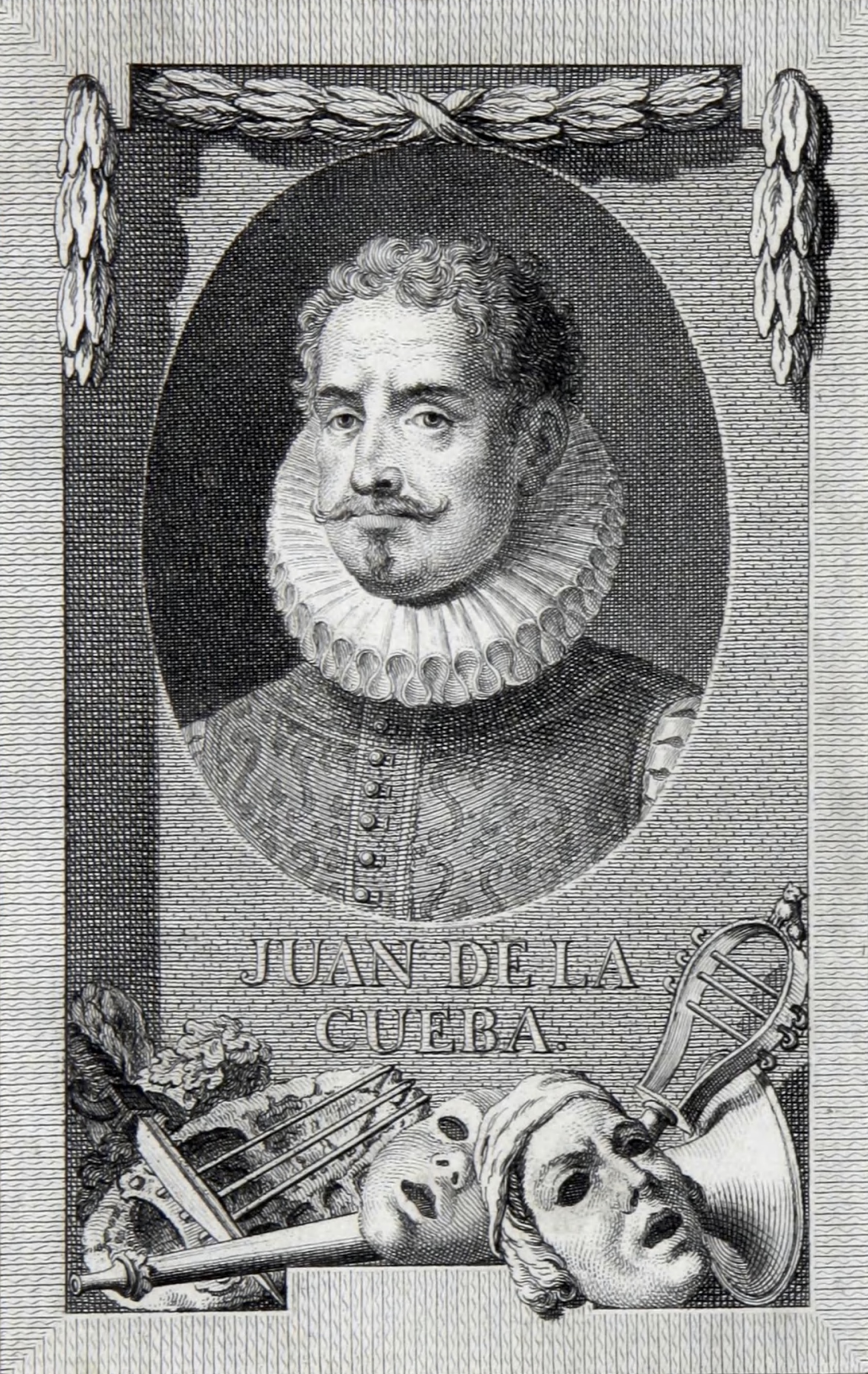 Retrat de Juan de la Cueva (1543-1612)